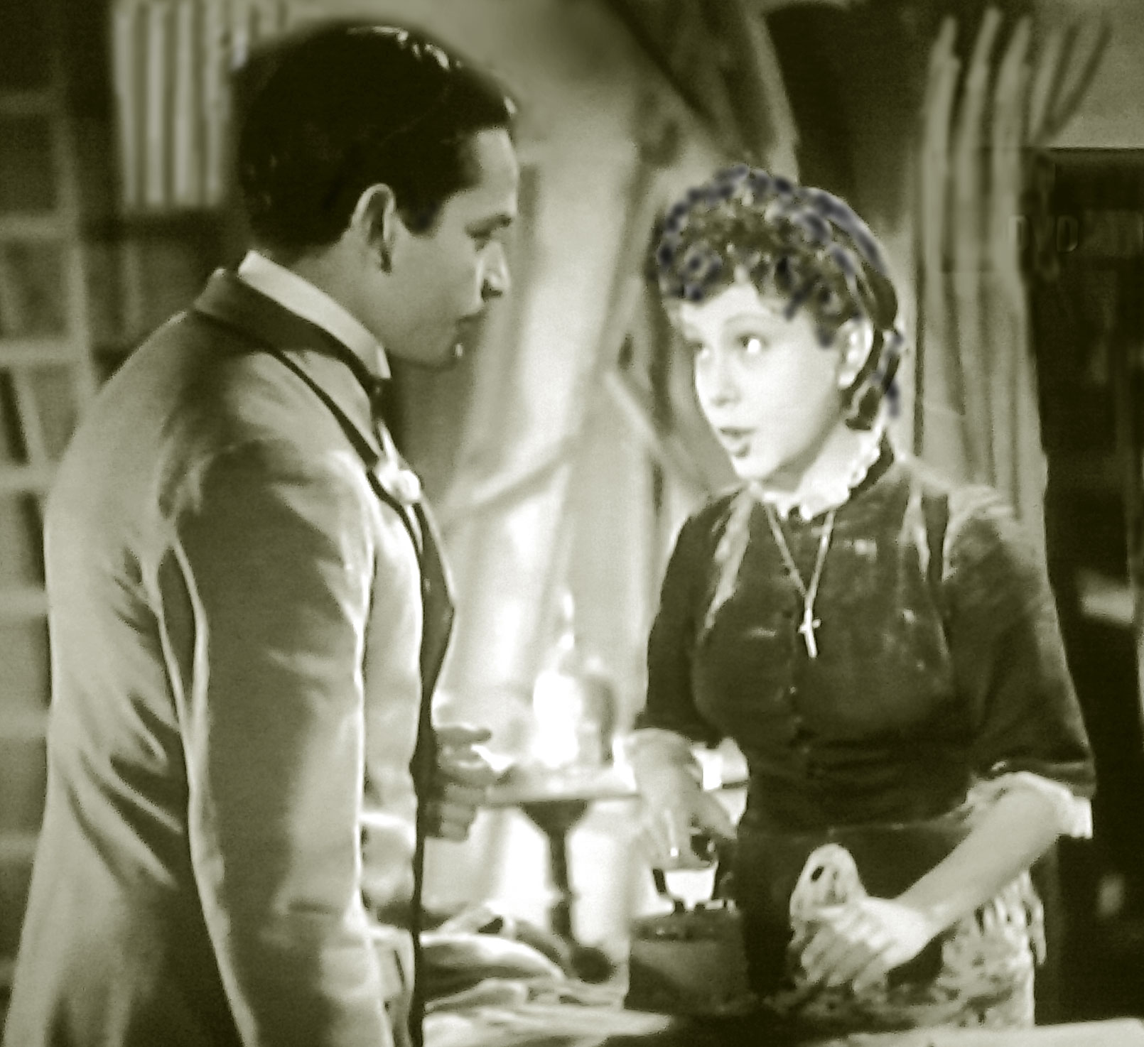 Andrea Checchi e Lilia Silvi in una scena di "Giù il sipario" (Matarazzo, 1940)